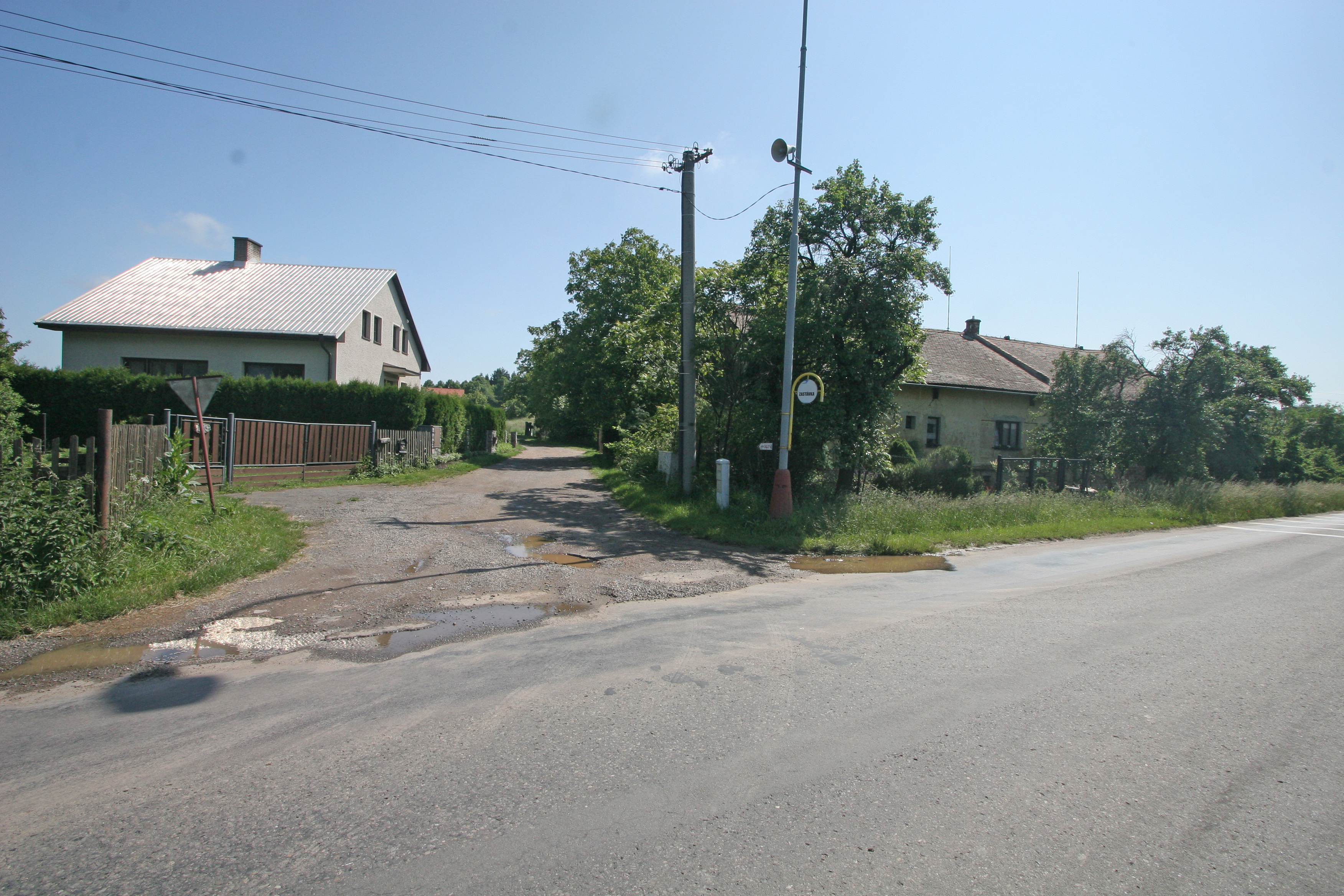 Vrcha čp. 198